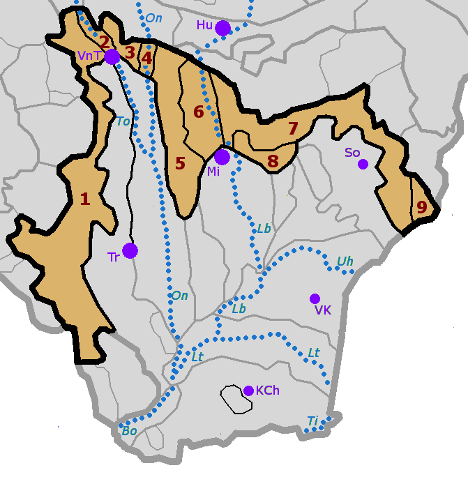 Členění geomorfologického celku Východoslovenská pahorkatina. Schematicky jsou znázorněny též nejvýznamnější vodní toky a města. Východoslovenská pahorkatina Podslanská pahorkatina Toplianska niva Vranovská pahorkatina Ondavská niva Pozdišovský chrbát Laborecká niva Podvihorlatská pahorkatina Zalužická pahorkatina Petrovské podhorie řeky / rivers Bo – Bodrog Lb – Laborec Lt – Latorica On – Ondava Ti – Tisa To – Topľa Uh – Uh města / towns Hu Humenné KCh – Kráľovský Chlmec Mi – Michalovce So – Sobrance Tr – Trebišov VnT – Vranov nad Topľou VK – Veľké Kapušany